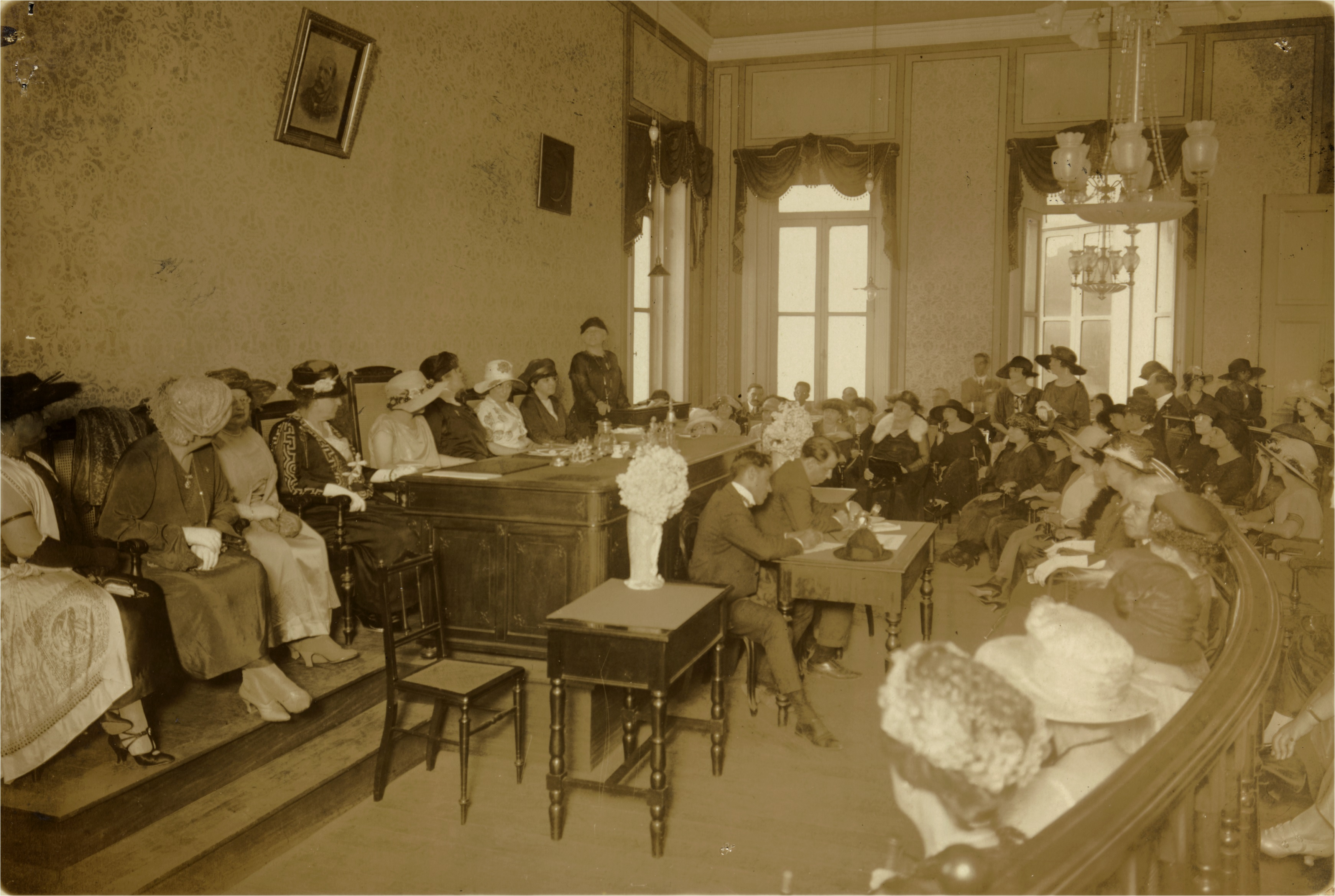 Congresso da Federação Brasileira para o Progresso Feminino – FBPF. Fundo: Federação Brasileira pelo Progresso Feminino.